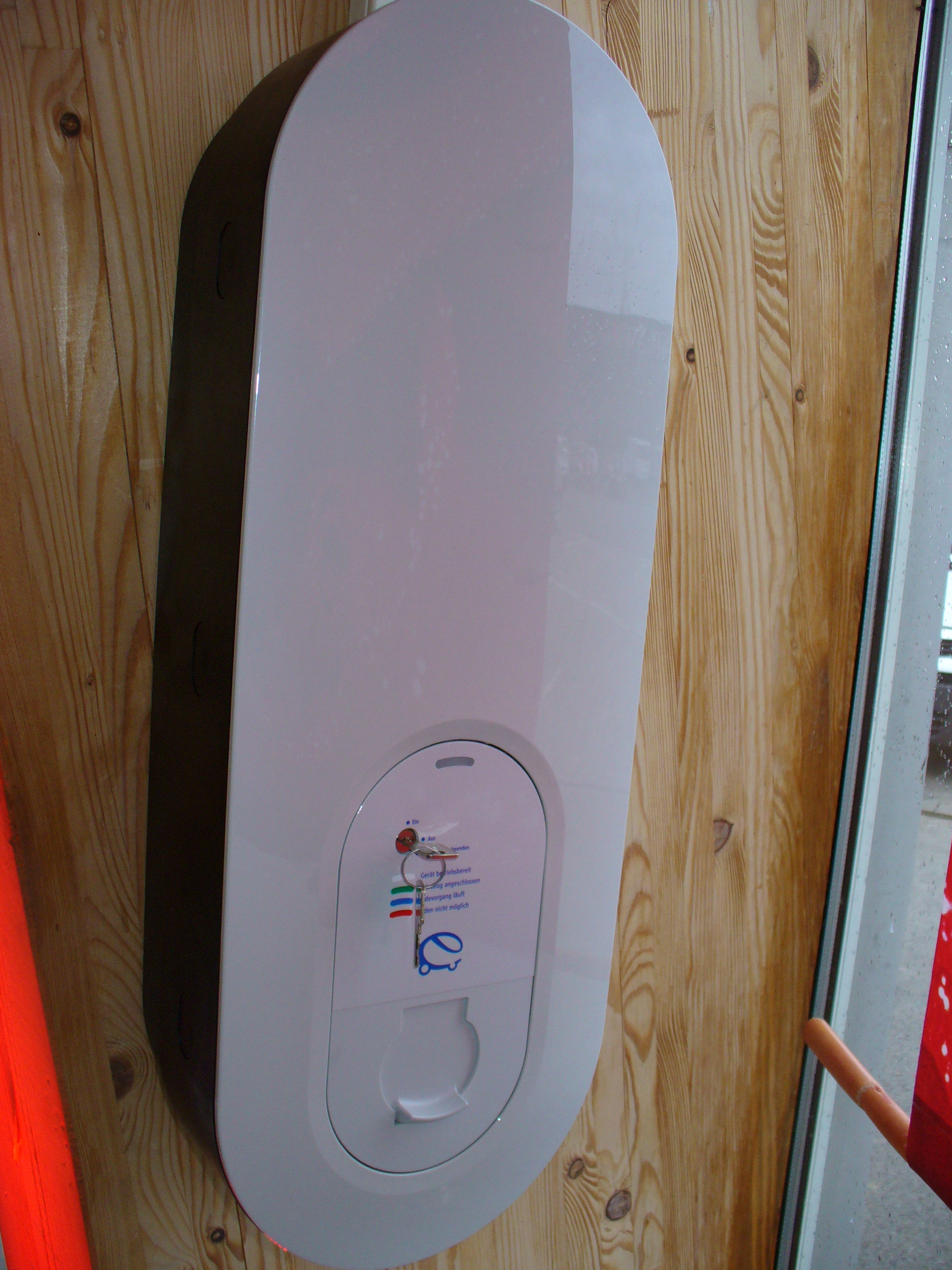 Wallbox von RWE für Nissan Lieaf, wahlweise mit Drehstromanschluss hausseitig 400V/16A (11kW) oder 400V/32A (22kW)